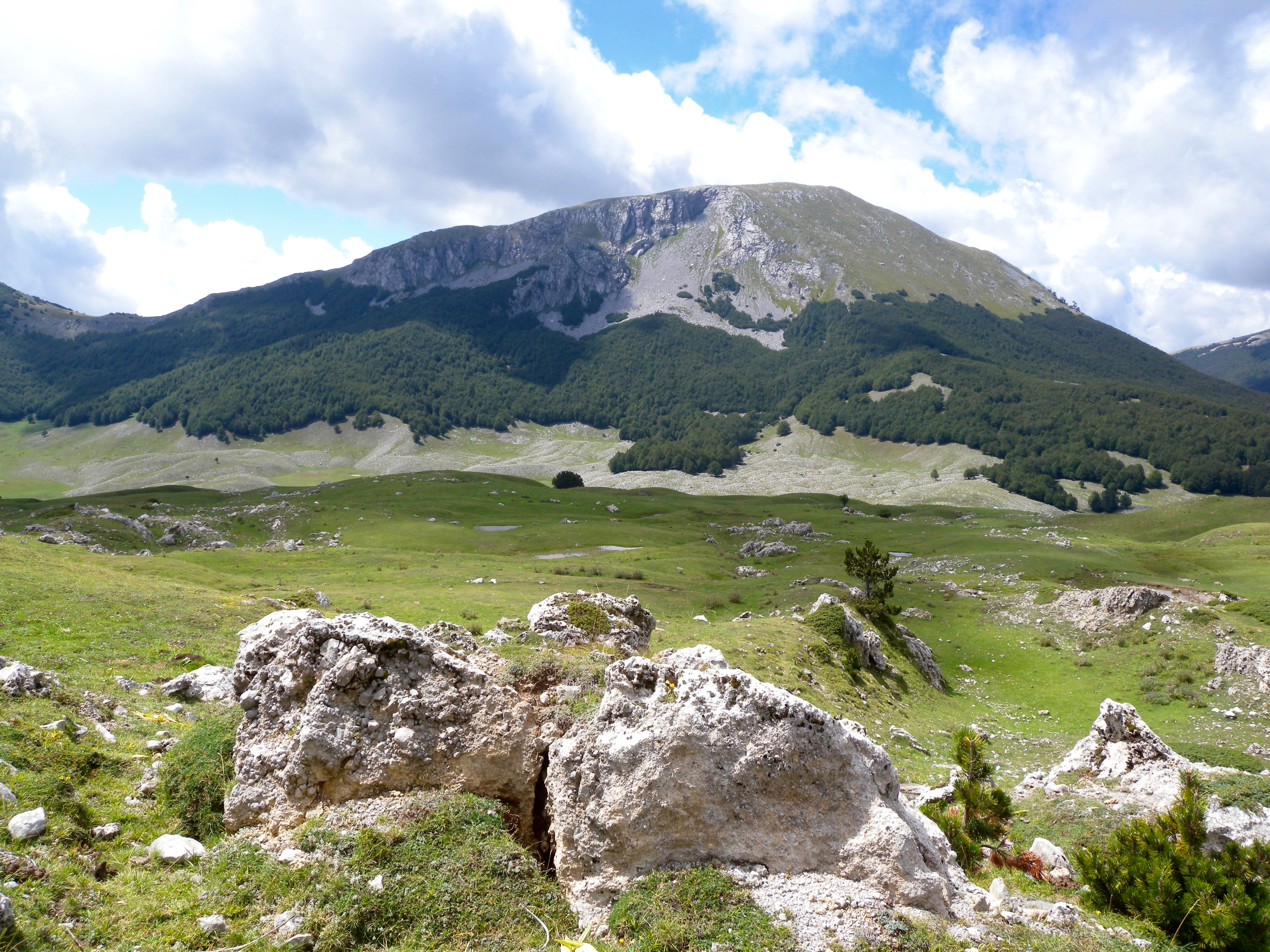 Il versante nord di Monte Pollino